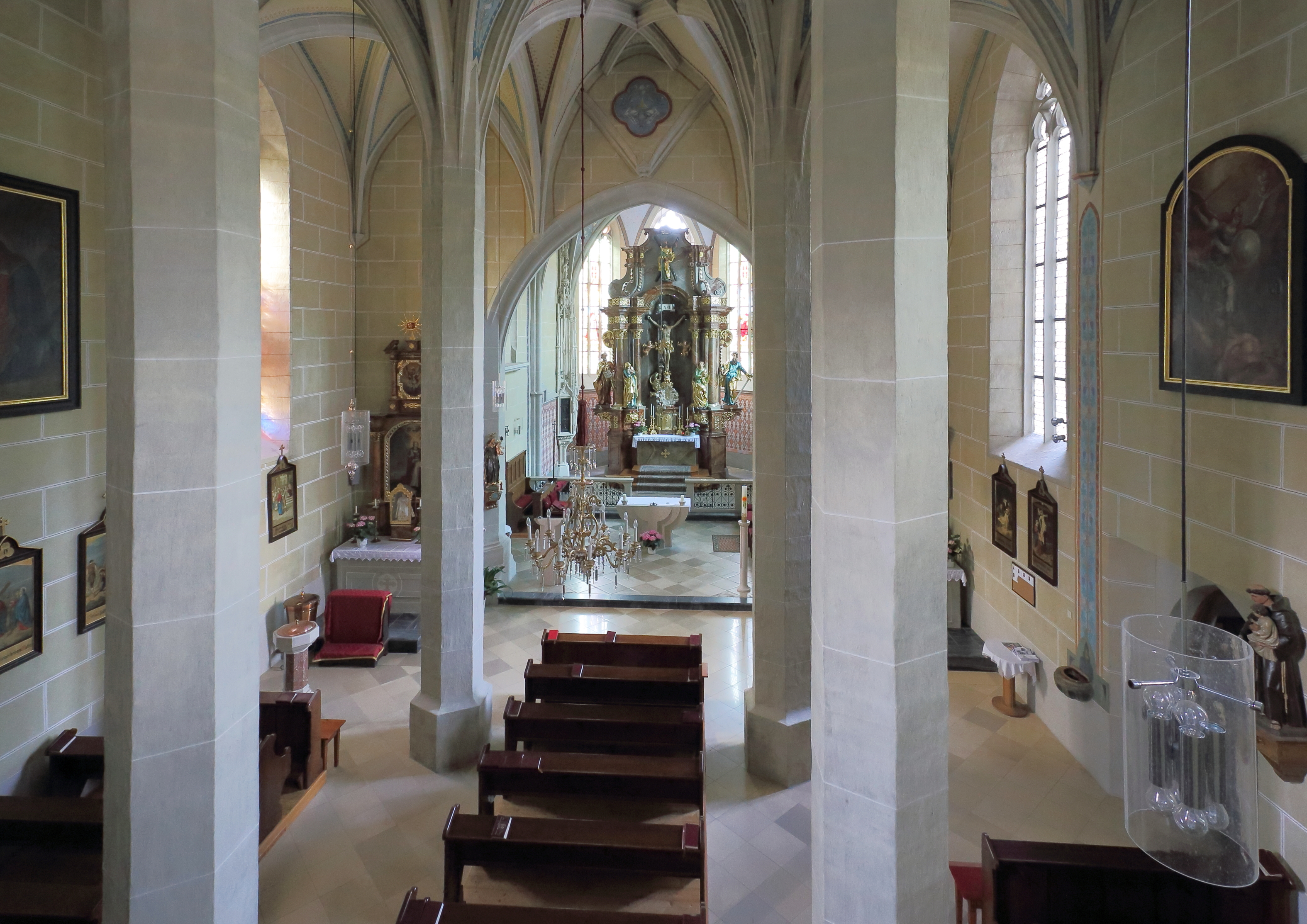 Blick vom Orgelempore Richtung Hochaltar in der Wallfahrts- und Pfarrkirche hl. Andreas in Heiligenblut, ein Ortsteil der niederösterreichischen Marktgemeinde Raxendorf.